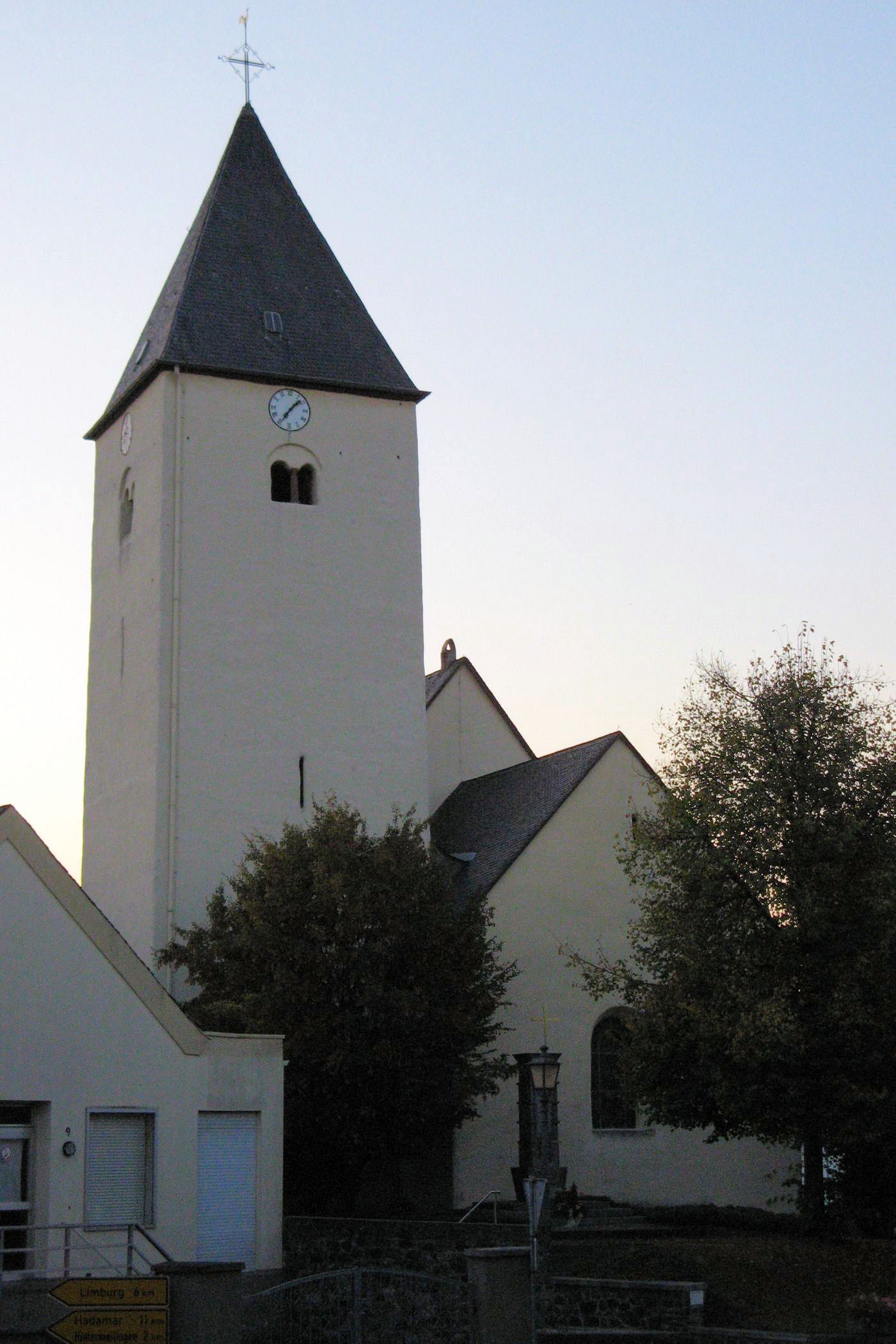 Romanische Pfeilerbasilika in Waldbrunn Lahr (Ostseite)